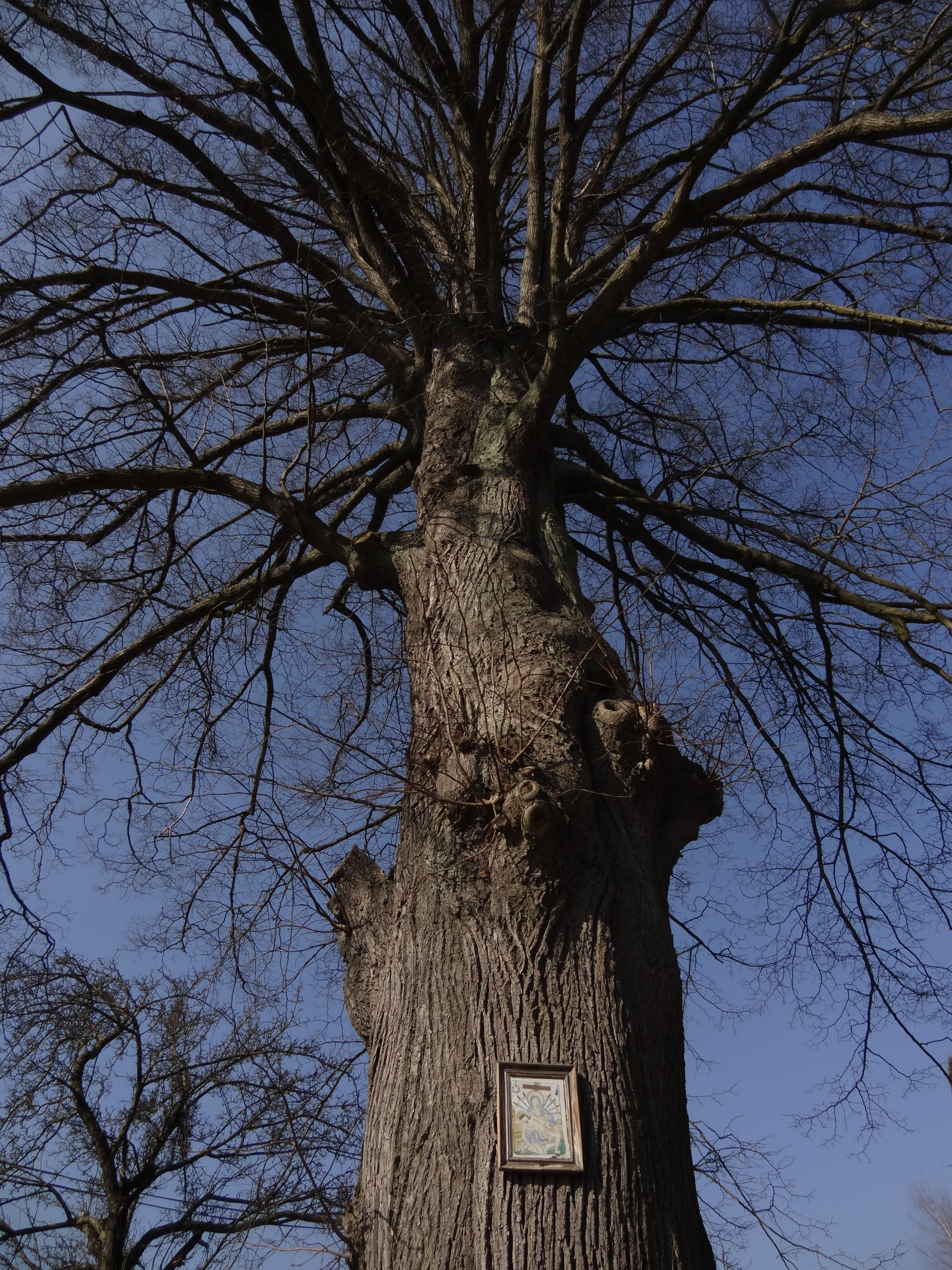 Proseč pod Ještědem-Domaslavice - strom s obrázkem poblíž sokolovny čp. 135